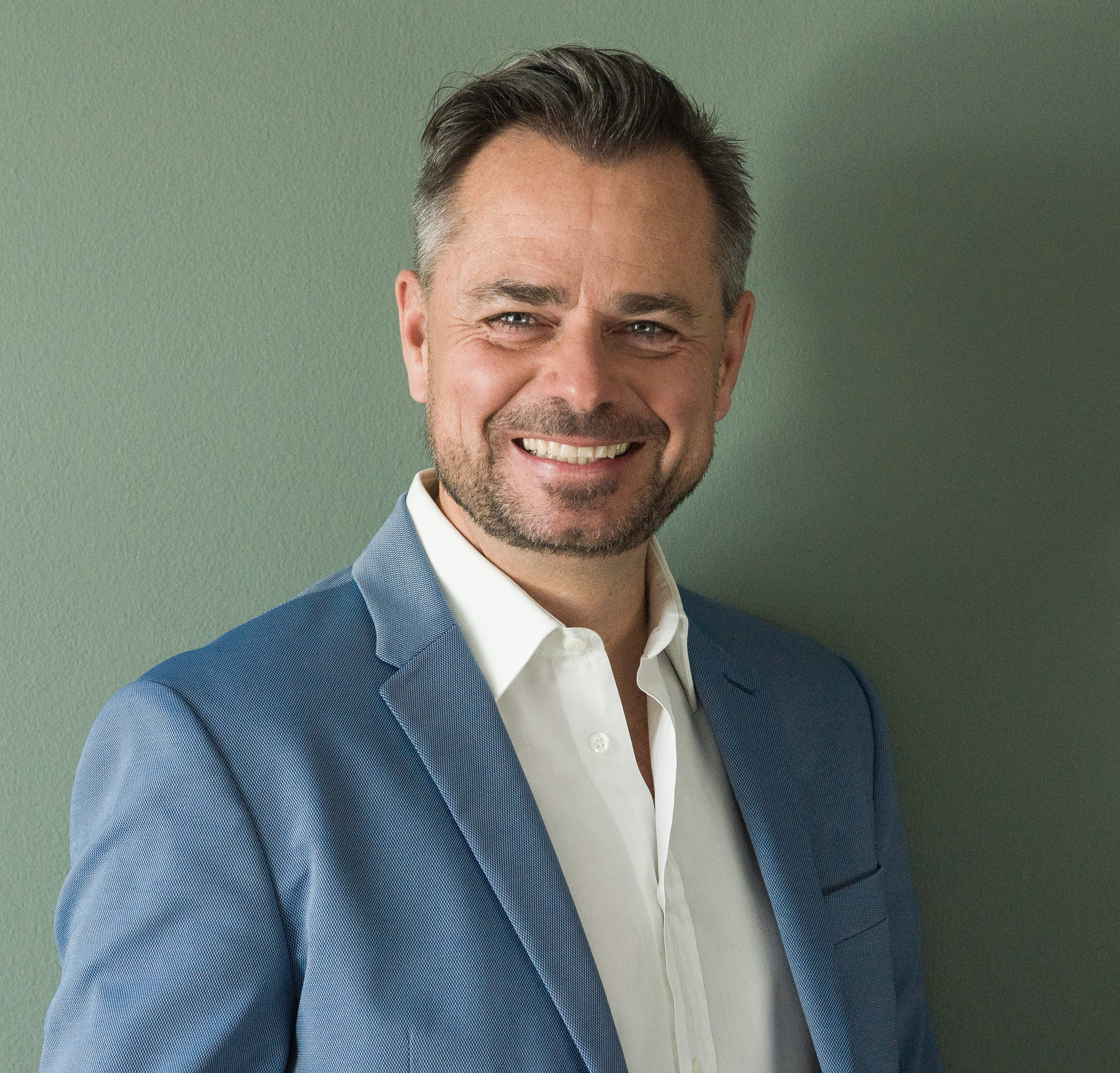 Foto von Moderator und Coach Michael Sporer